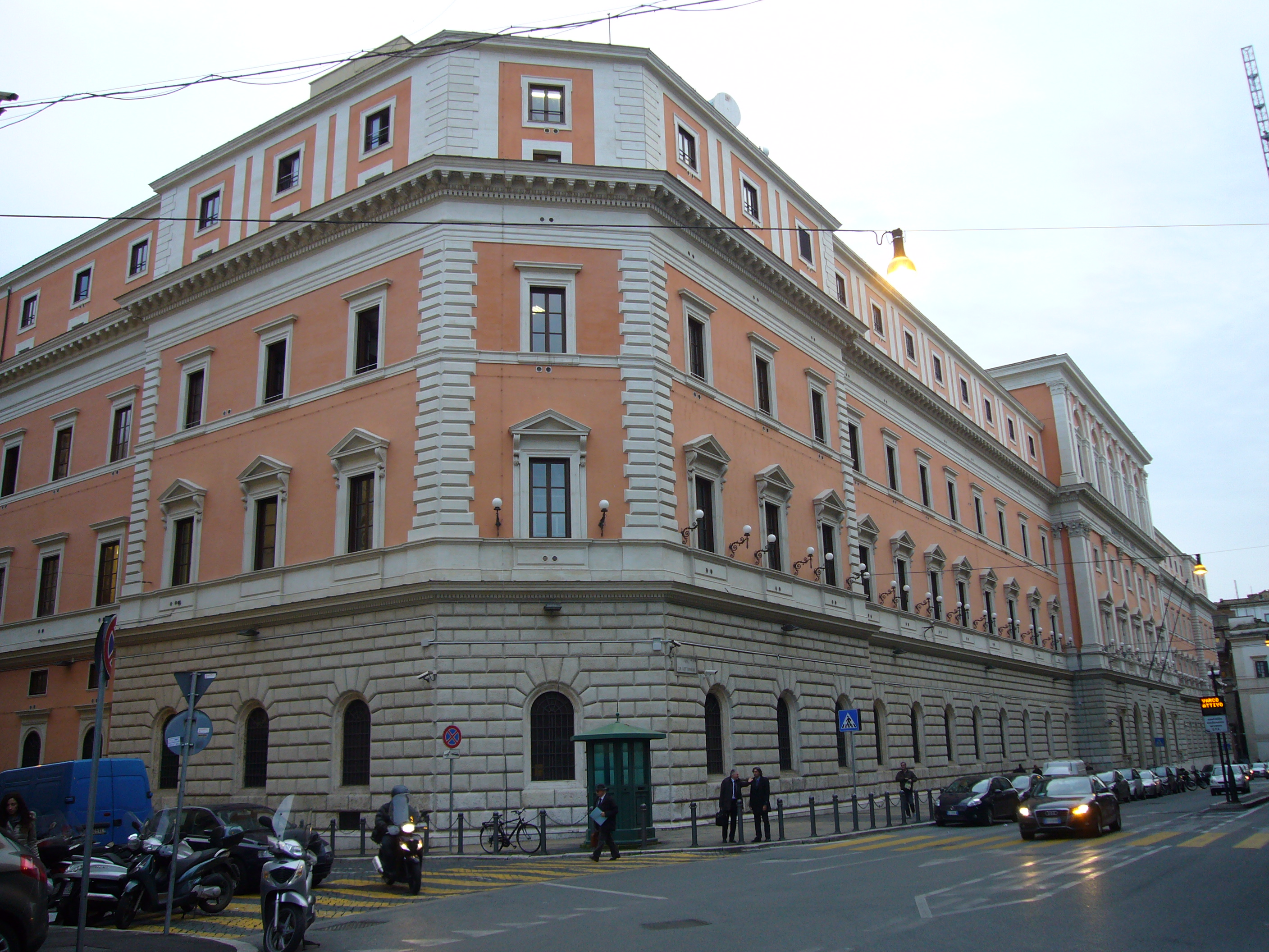 Roma, Palazzo Esercito, sede dello stato maggiore della Difesa a via XX Settembre 123, angolo via Firenze.